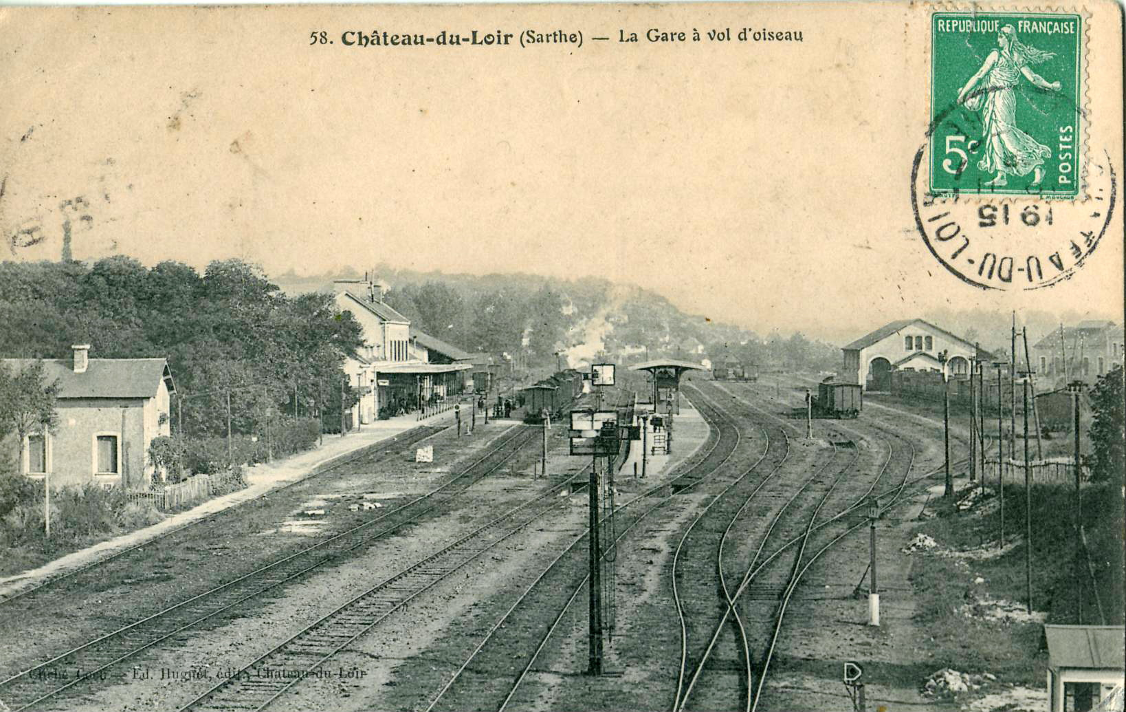 Carte postale ancienne éditée par Huguet à Château-du-Loir, n°58 : CHÂTEAU-DU-LOIR - La Gare à vol d'oiseau